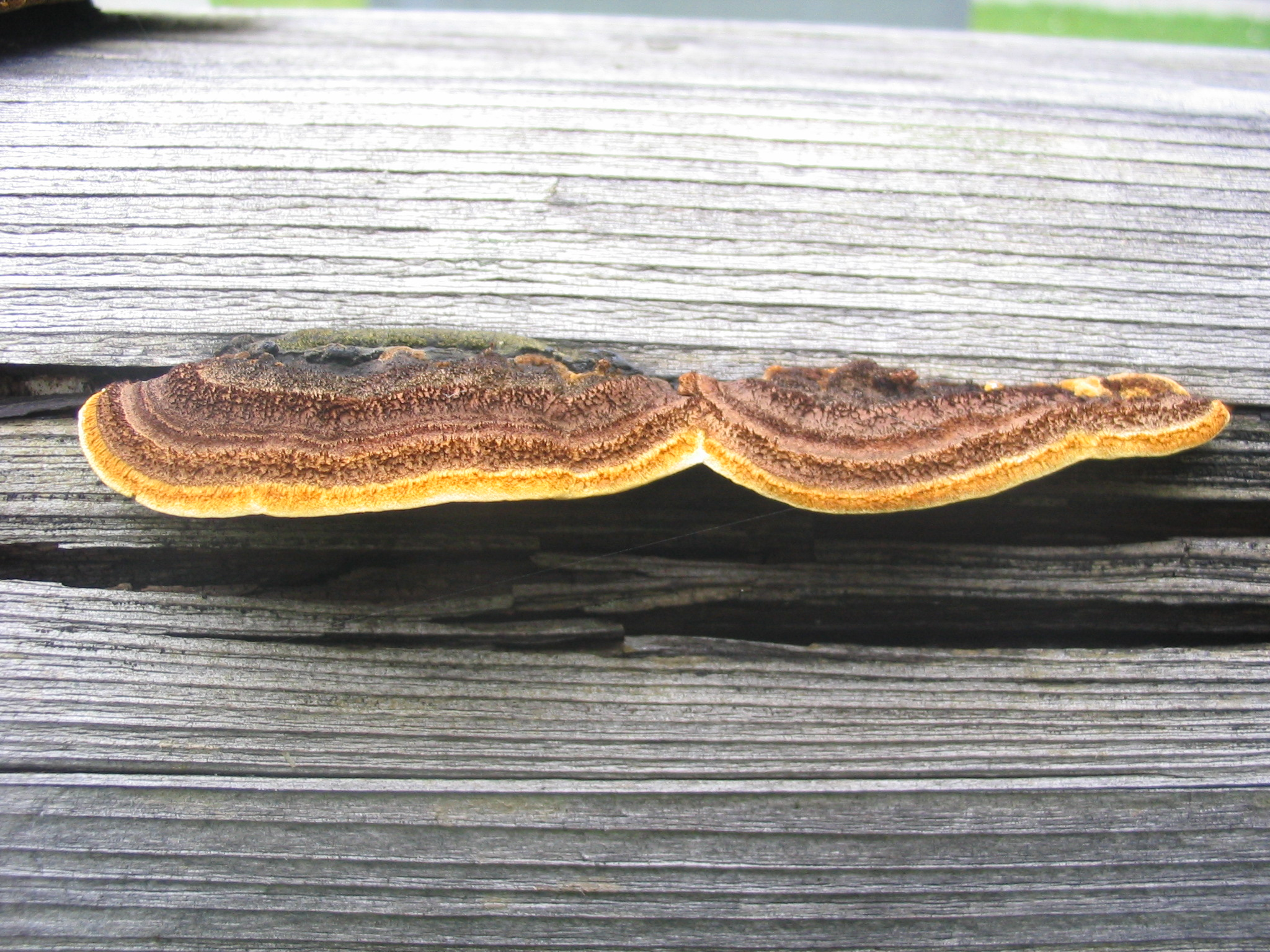 Zaunblättling, Gloeophyllum separium, Fruchtkörper, Aufgenommen von Dr. Hagen Graebner, 06.10.2007